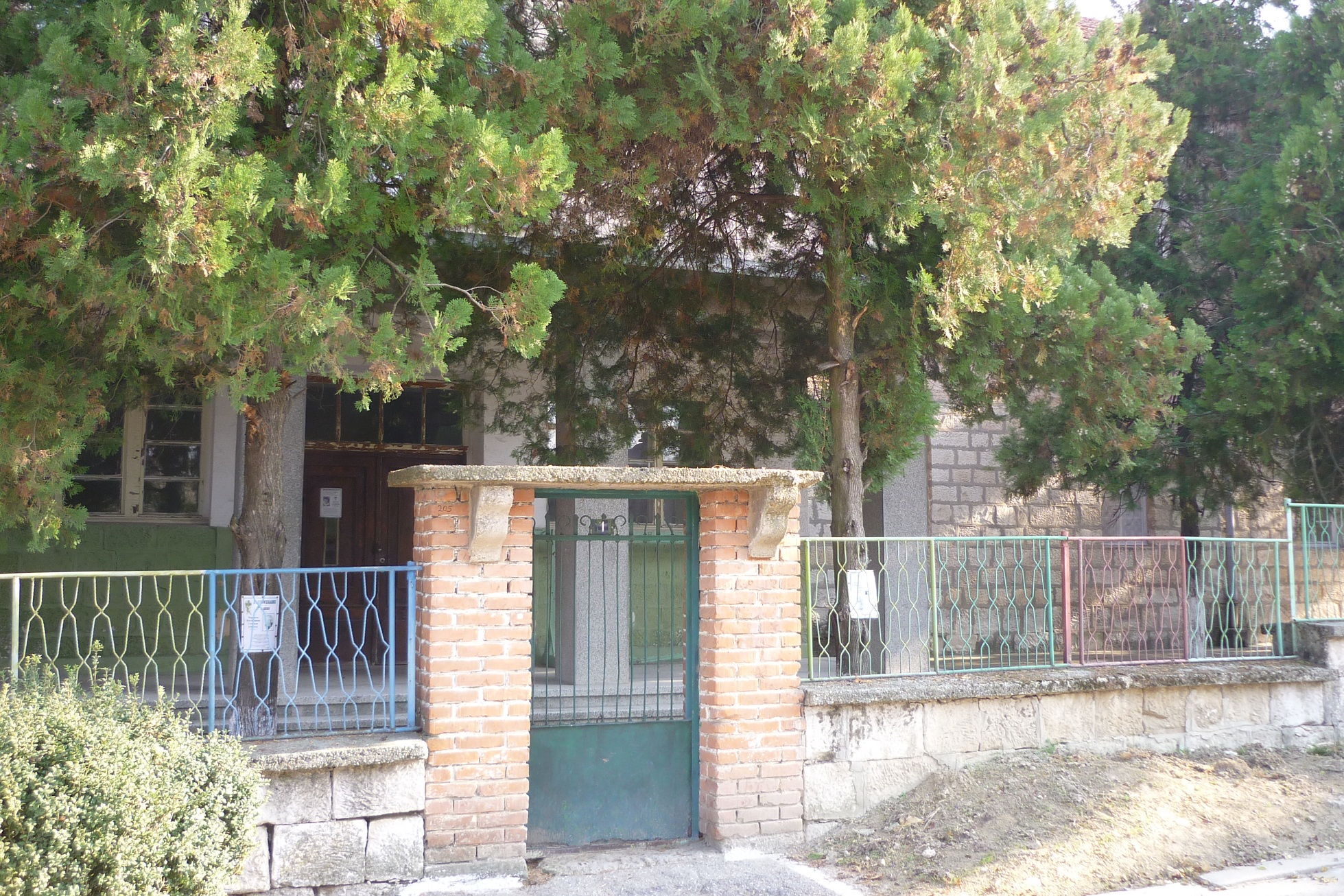 ЦДГ "Здравец"